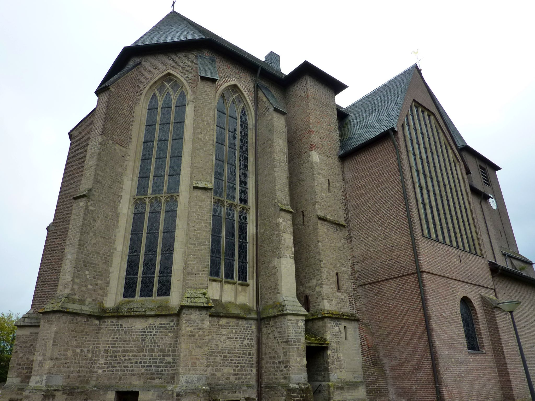 Saint Martin Church (Zyfflich)